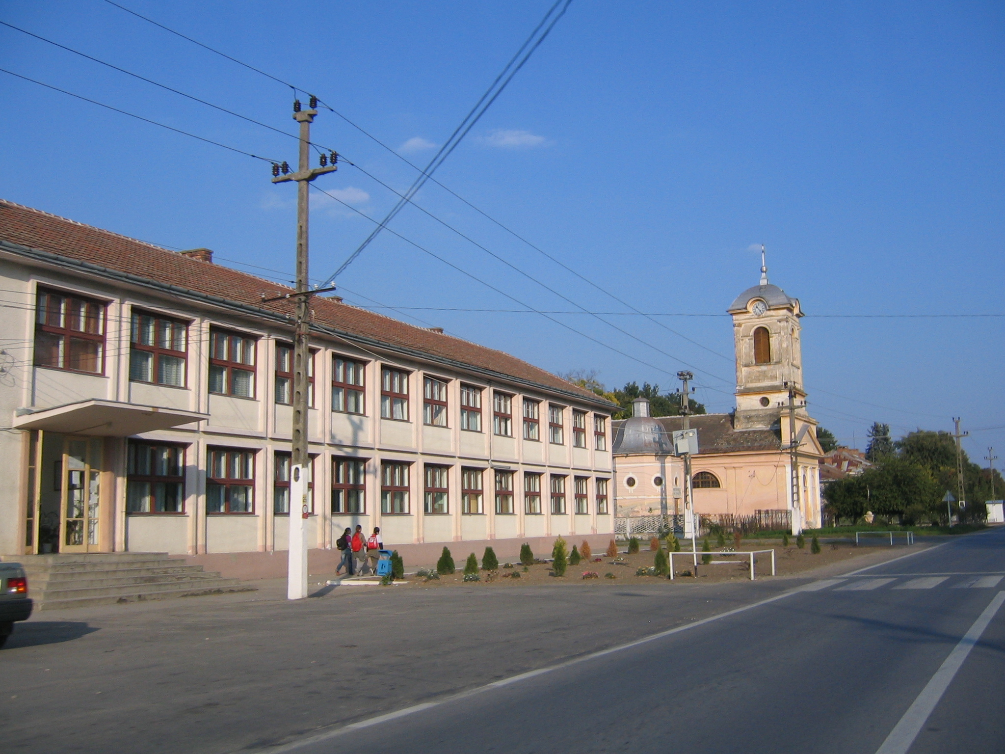 Şcoala şi biserica romano-catolică din Lovrin